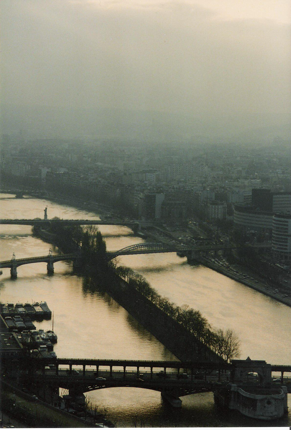 Seine, Île aux Cygnes, Maison de Radio France — vues depuis la Tour Eiffel